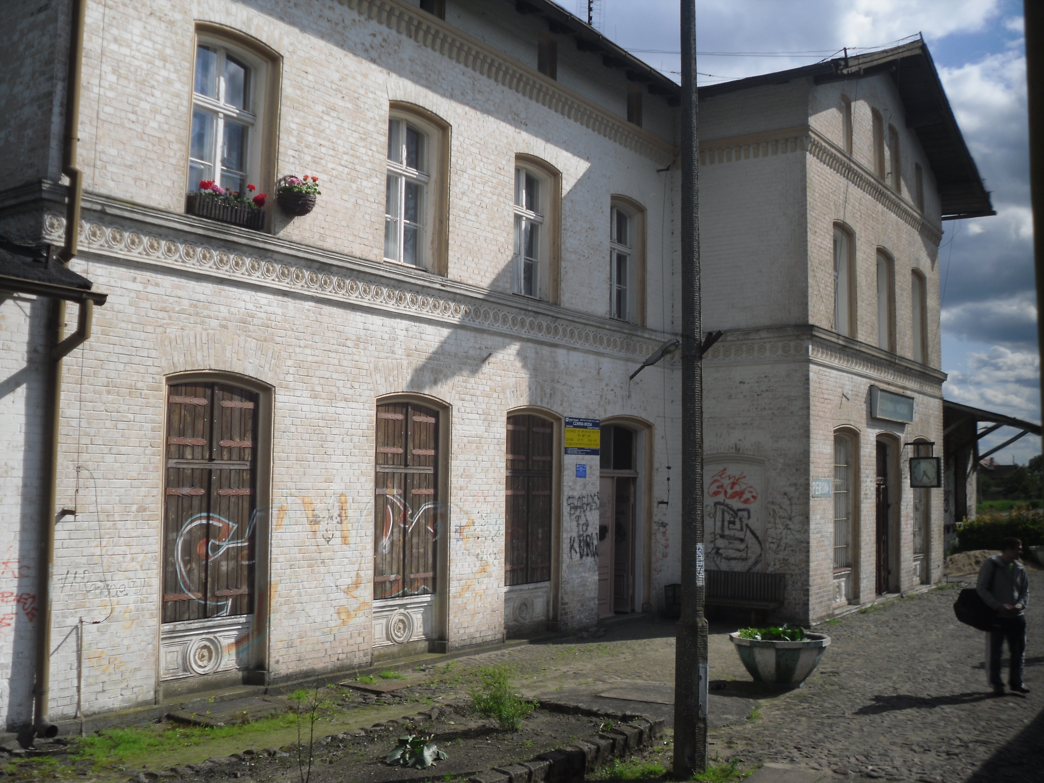 Dwozec w Czarnej Wodzie